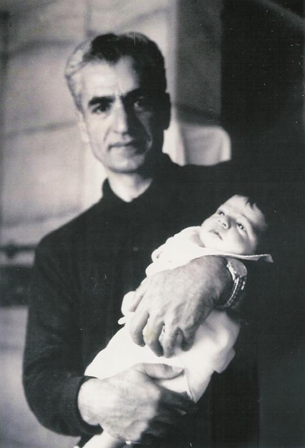 محمدرضا پهلوی پس از تولد شاهدخت فرحناز پهلوی سال 1342